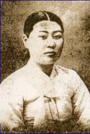 玄桂玉현계옥